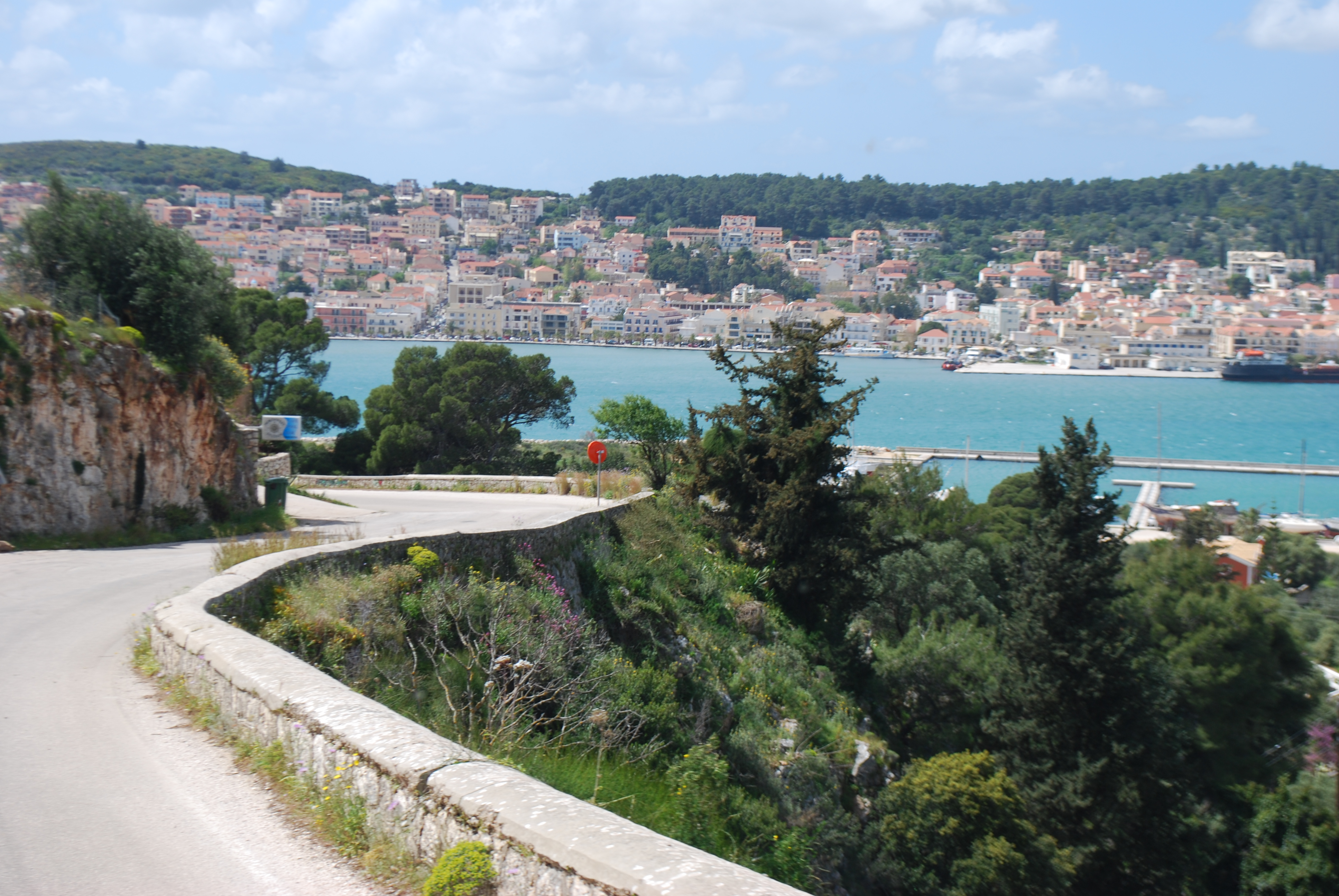 Vue d'Argostoli depuis la route de Drapano.